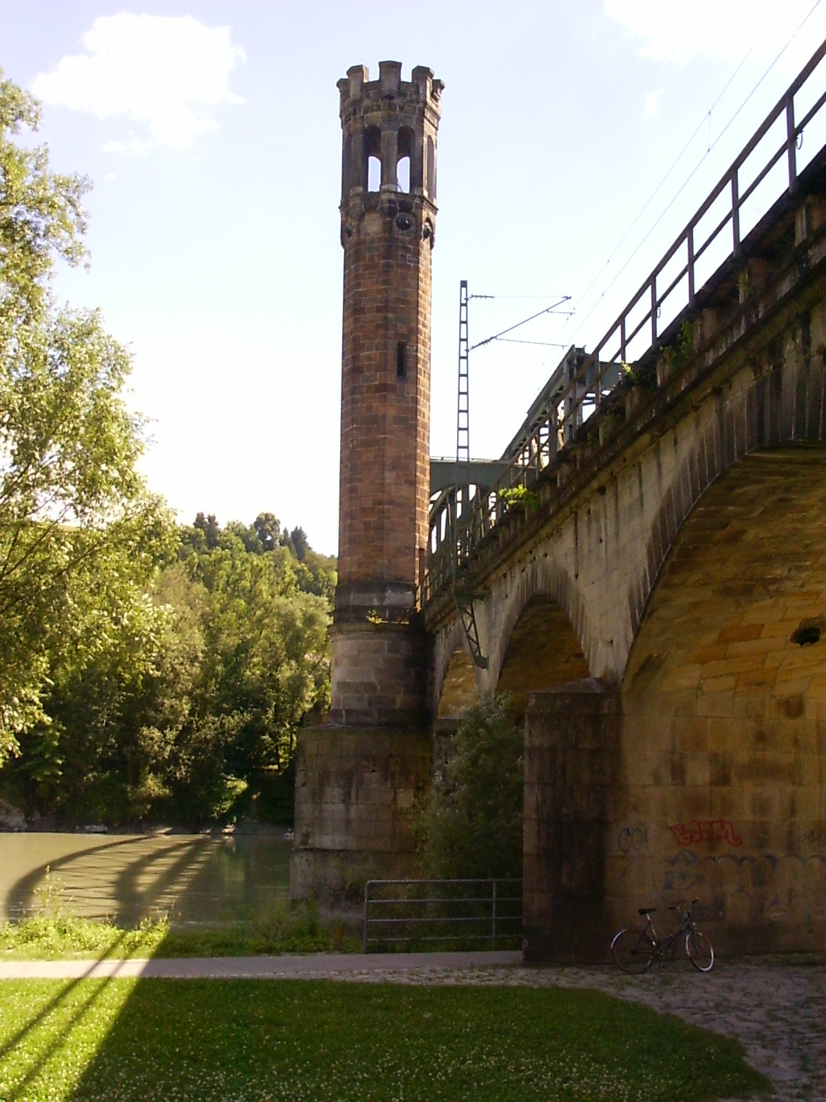 Kaiserin-Elisabeth-Brücke Passau